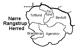 Als Nørre Herred, Sønderborg Amt, Danmark.